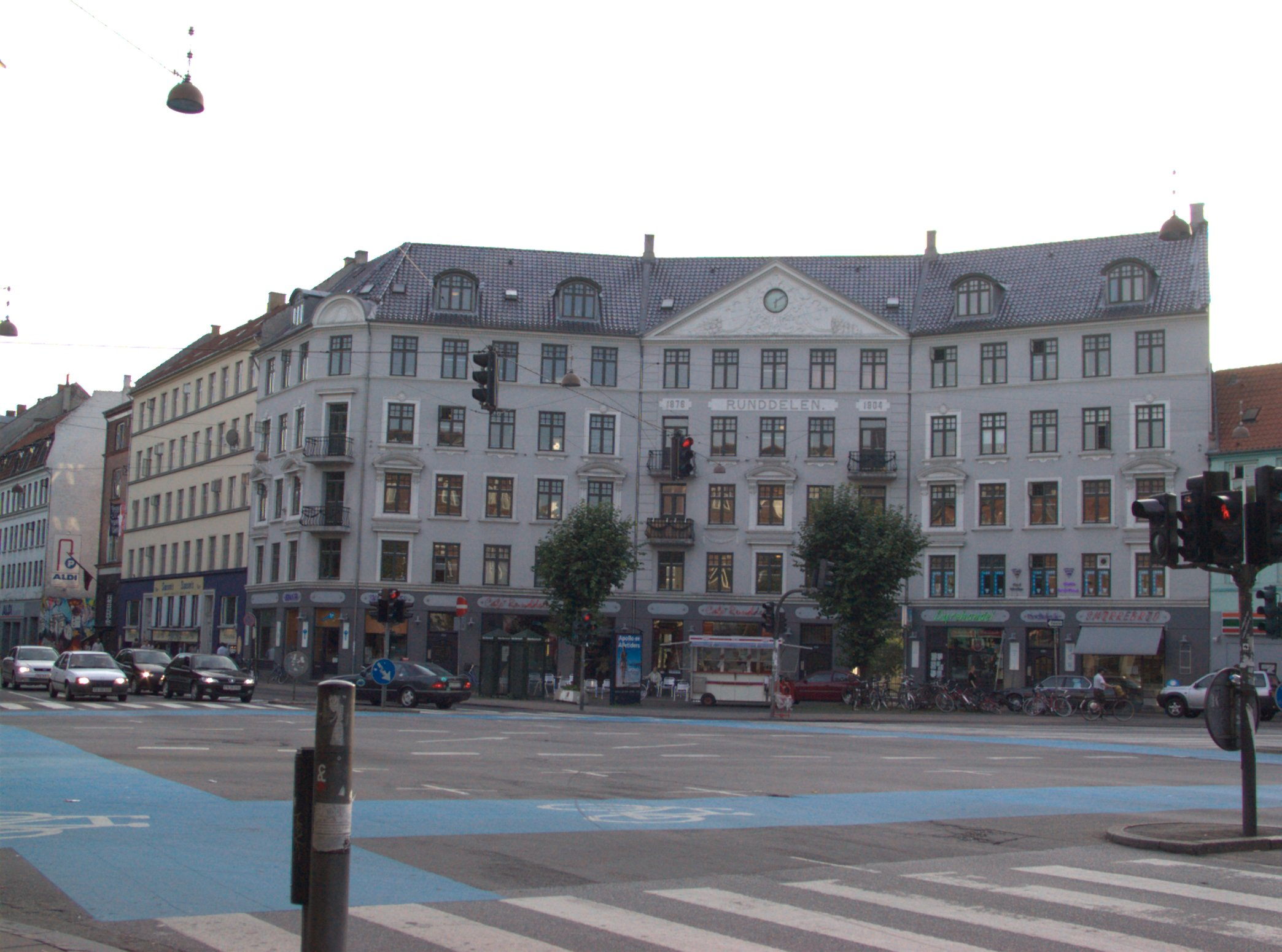 Nørrebros Runddel is a plaza on Nørrebro in Copenhagen.